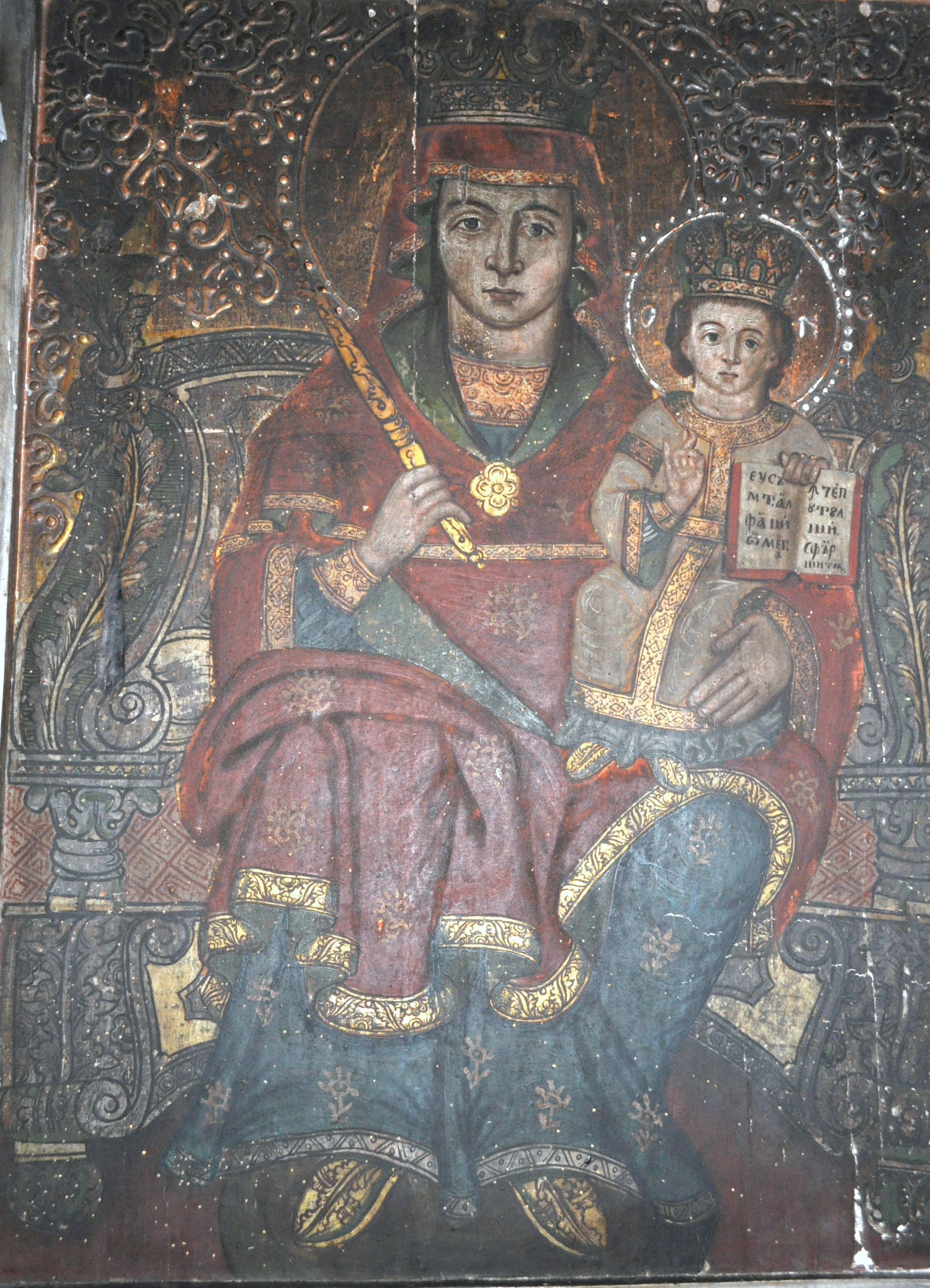 Biserica de lemn din Roșia Nouă, județul Arad